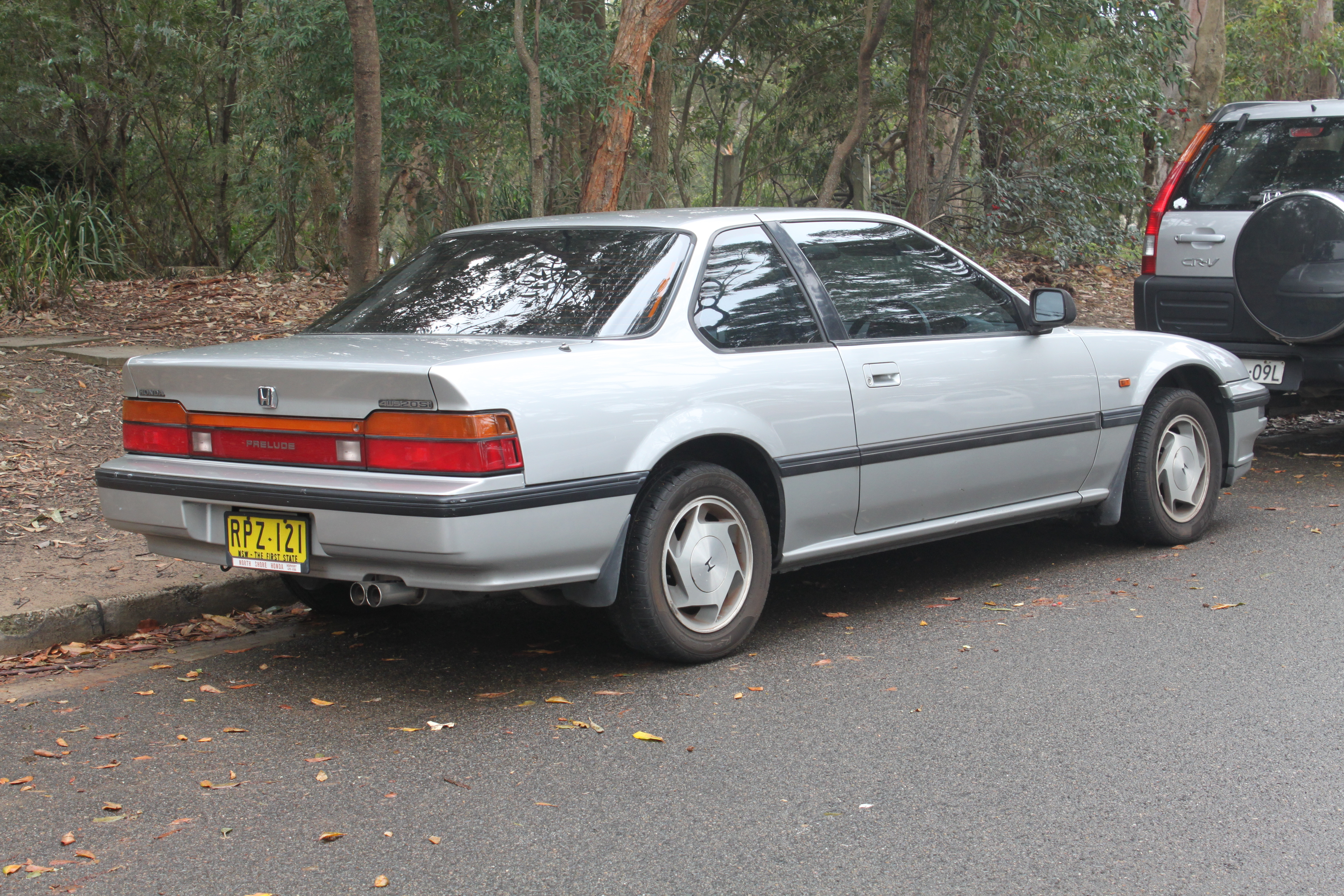 1989 Honda Prelude 4WS 2.0 Si